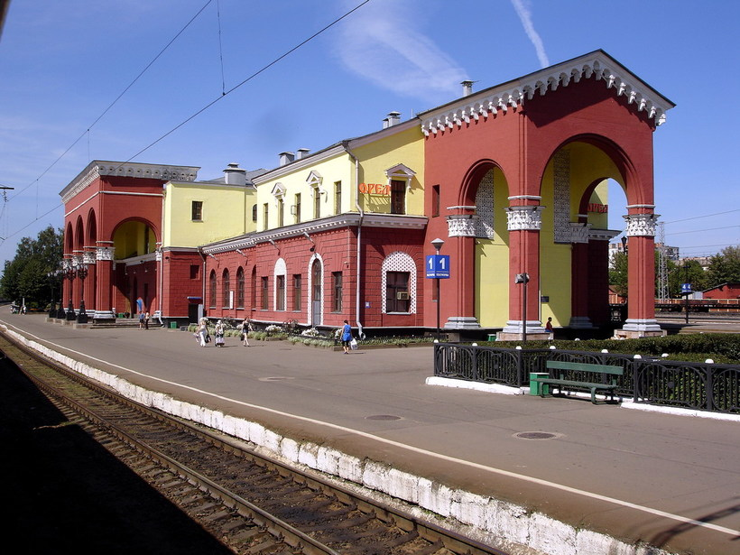 Здание железнодорожного вокзала: площадь Привокзальная, 1, Орёл, Орловская область